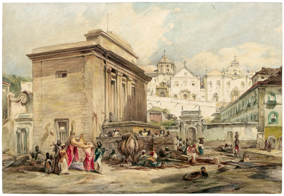 Der Largo di Carioca in Rio de Janeiro. Aquarell. 24,4 x 35,3 cm. Um 1850.